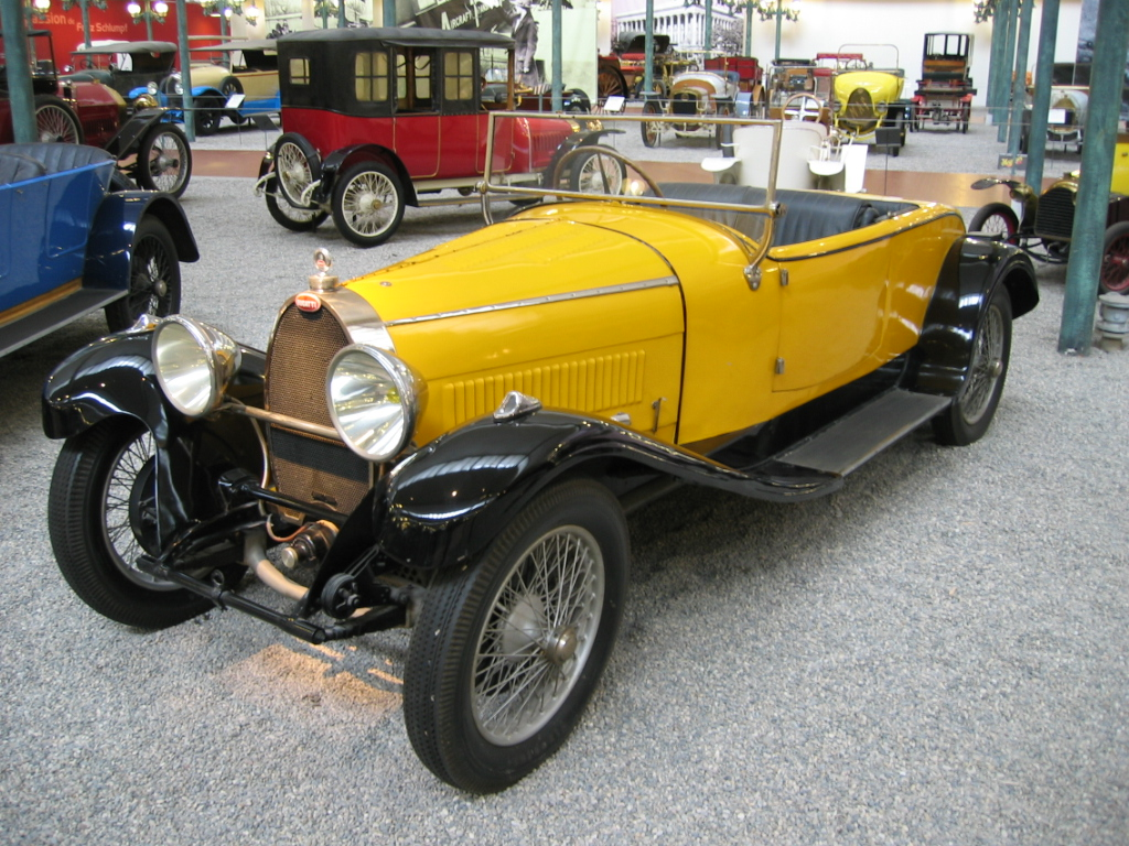 Bugatti Type 38 - Musée de l'automobile de Mulhouse